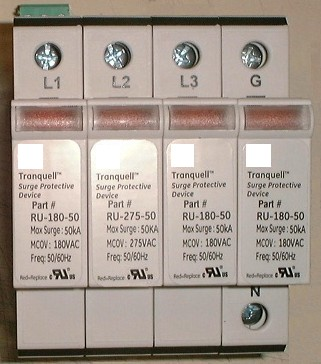 日本に輸入販売されているGE社製UL認証TYPE2（JISではクラスⅡ）100/200V単相・三相兼用低圧交流電源用SPD。Imax 50kA 8/20μs。GE社登録商標消去処理。有限会社平川製作所より個人購入した自宅用SPD盤予備部品を撮影。(General Electric UL（US and Canada) TYPE2 4-pole 50kA surge protector for din rail mounting in switchboards)